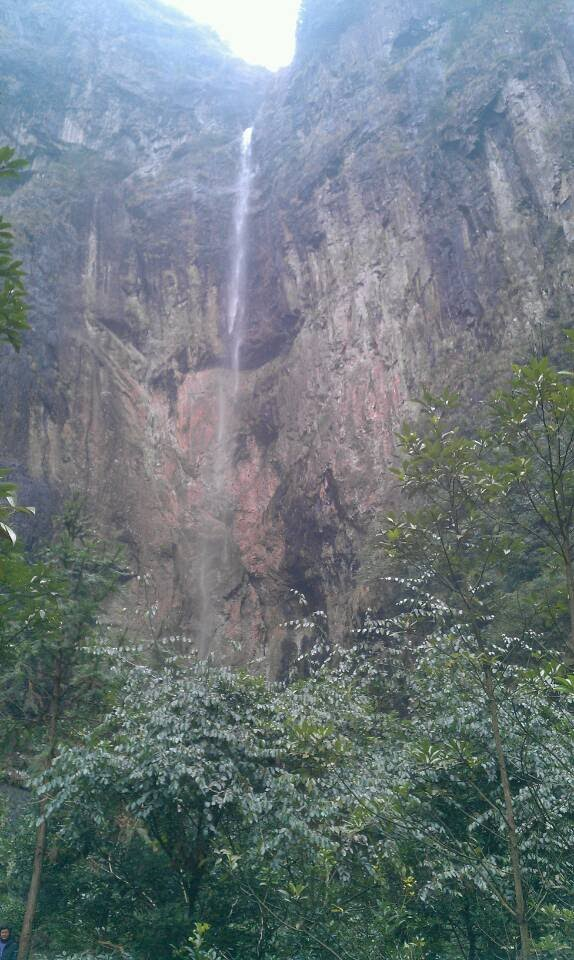 中国浙江省仙居县神仙居飞瀑